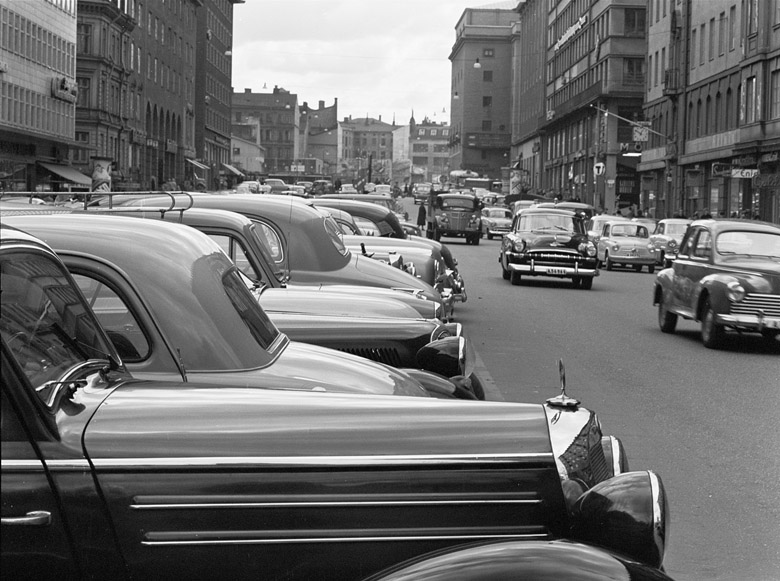 Sveavägen, I bakgrunden Klara och blivande Sergeltorg. Norrmalm. Motiv: Stockholms innerstad Nyckelord: Riksintressen Kategori: StadsmiljöSveavägen, I bakgrunden Klara och blivande Sergeltorg. Norrmalm.